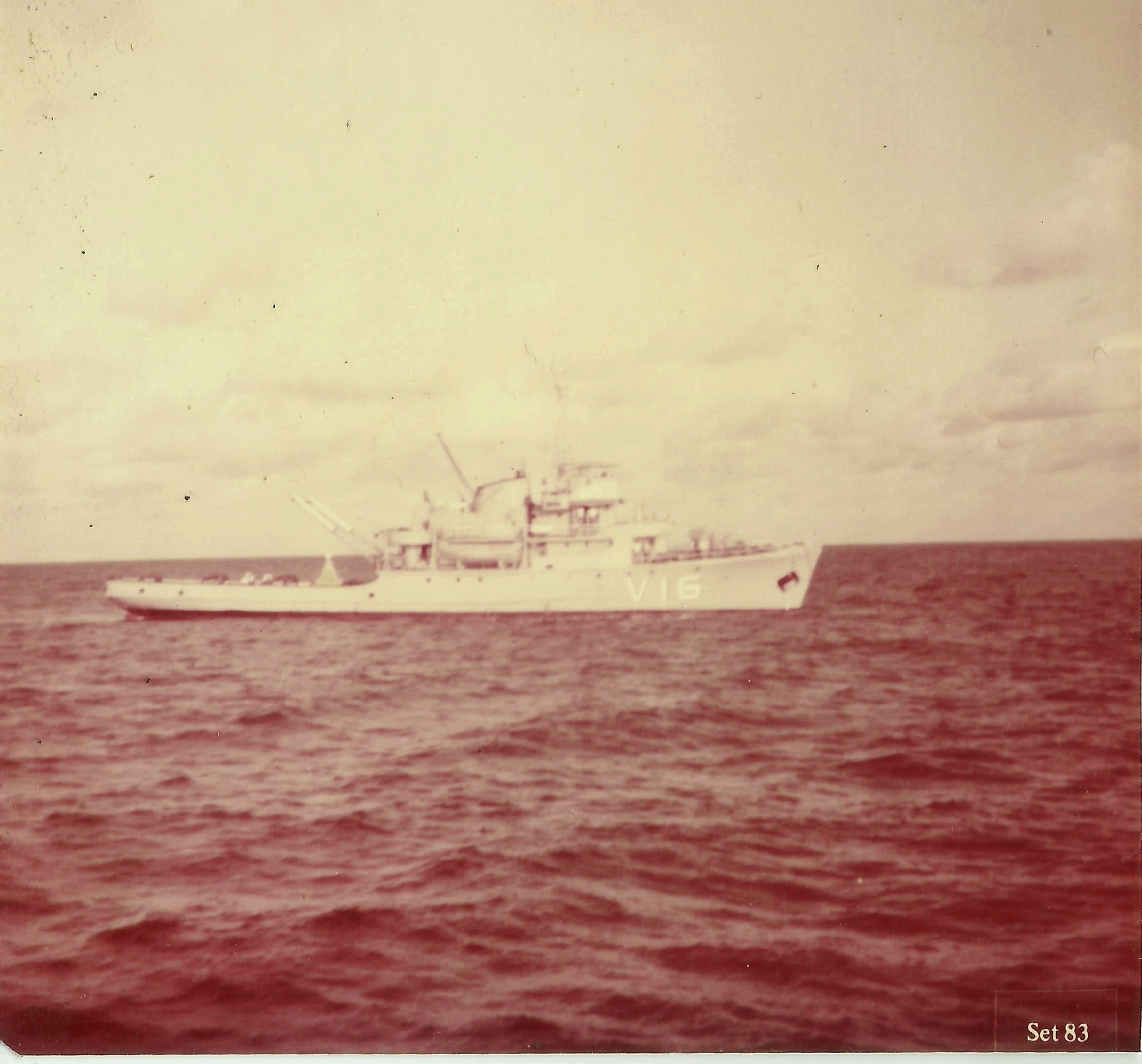 Corveta Iguatemi (V-16), quando em patrulha costeira no mar territorial brasileiro, litoral do estado do Amapá em Setembro de 1983.